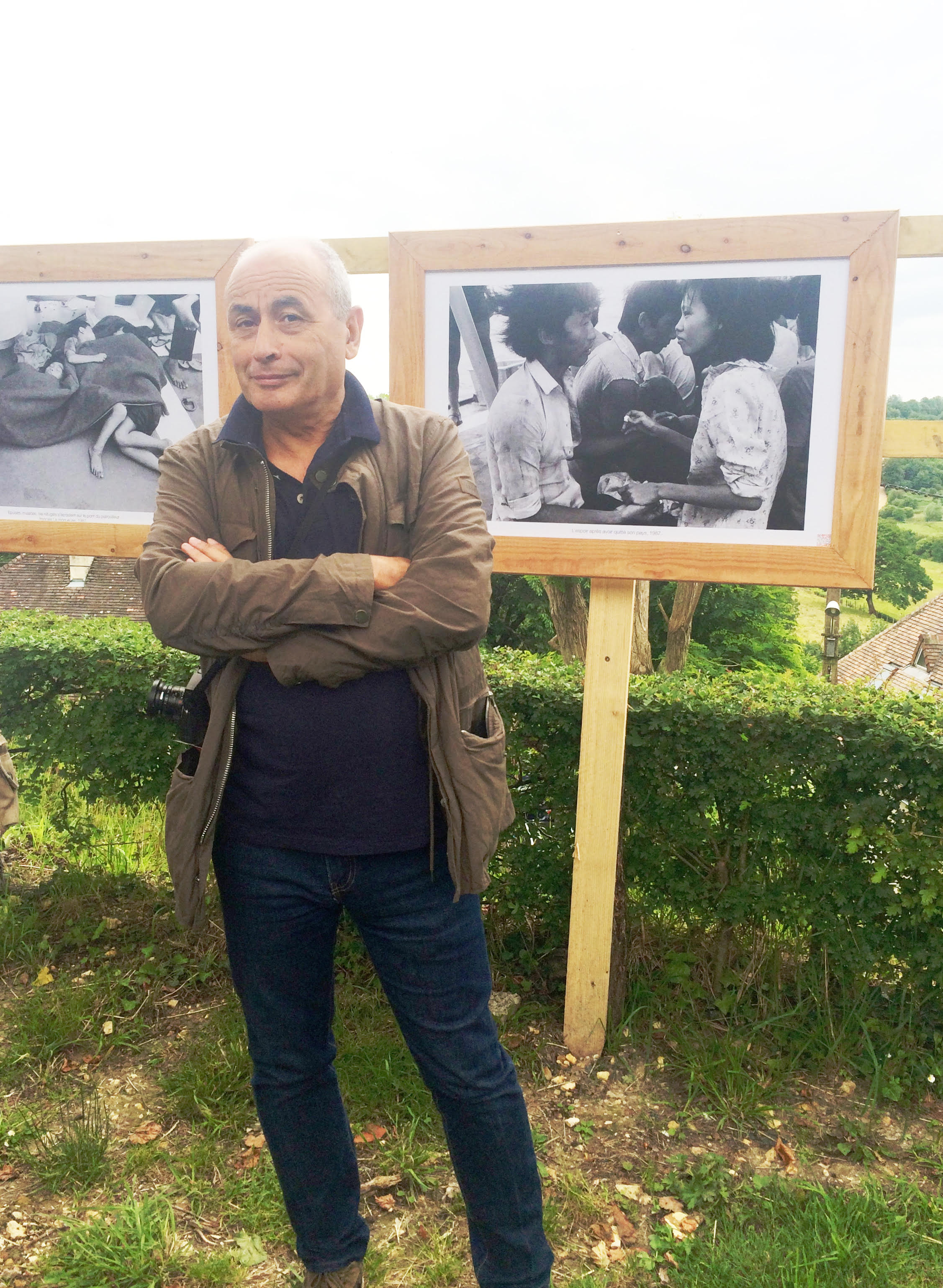 José Nicolas devant ses images des "French Doctors", un reportage sur les actions de Médecins du Monde dans les années 80. Photographies présentées au festival de Bellême (16 juin-2 sept 2018)